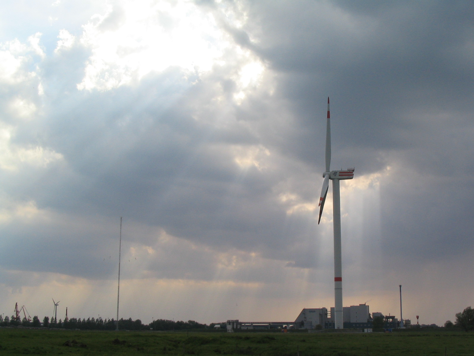 5M REpower wind energy converter in Brunsbüttel